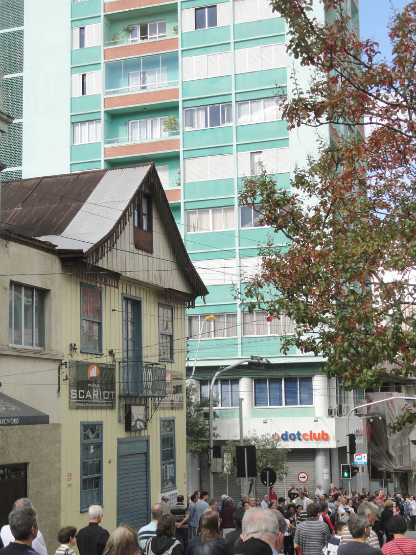 O velho e o novo na avenida Júlio de Castilhos